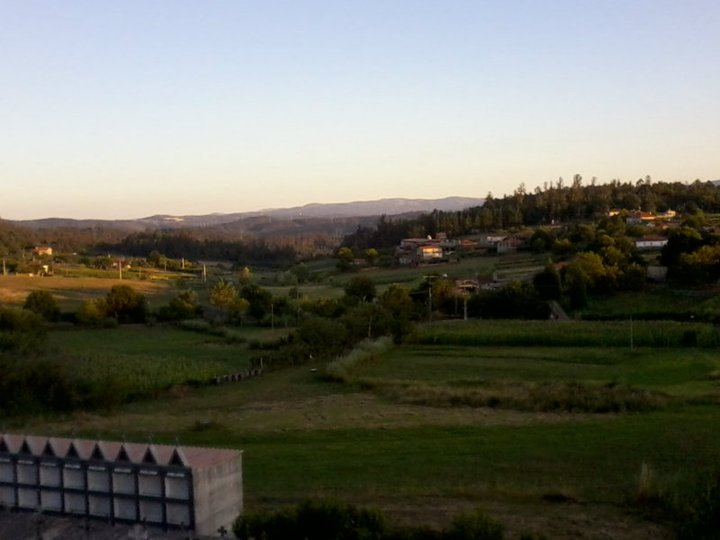 Panoramica de Santa Uxía de Fao.